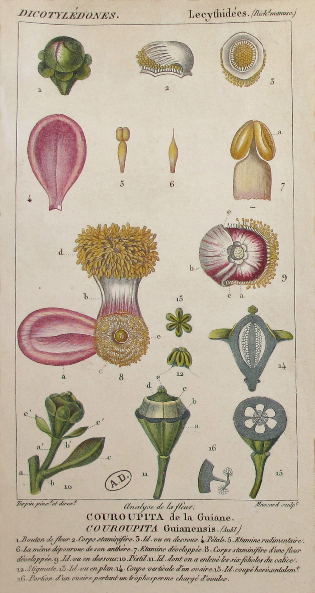 détails d'une fleur de Couroupita guianensis